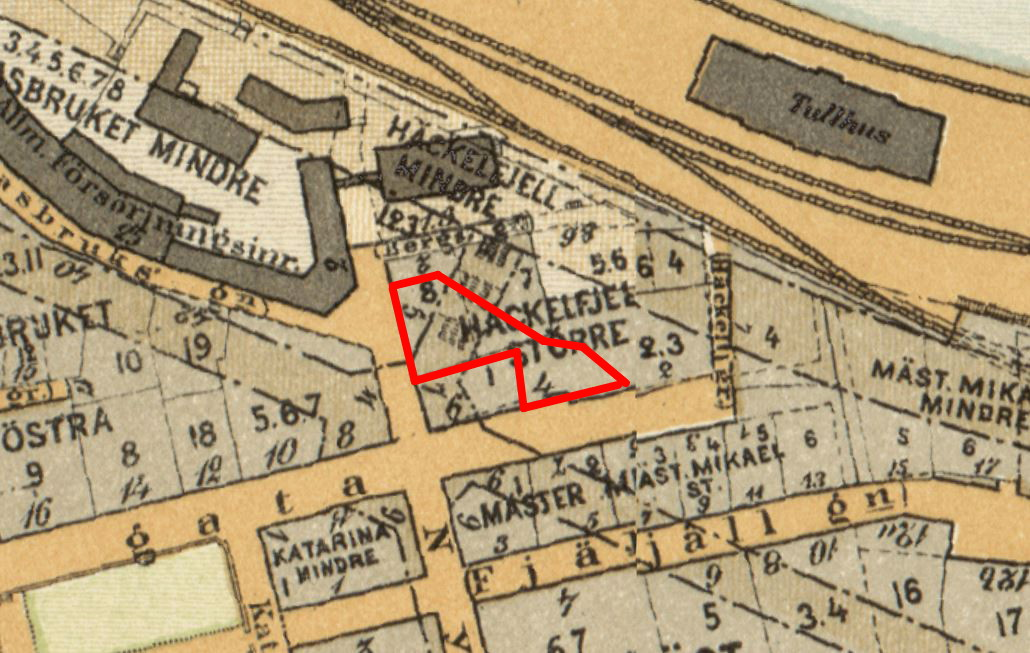 Häckefjäll större 1899 med fastigheten Terrassen 16